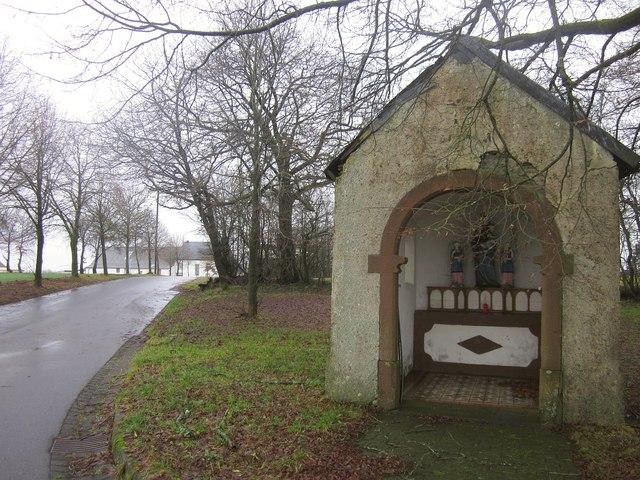 Kapelle, Rodershausen (Shrine, Rodershausen)